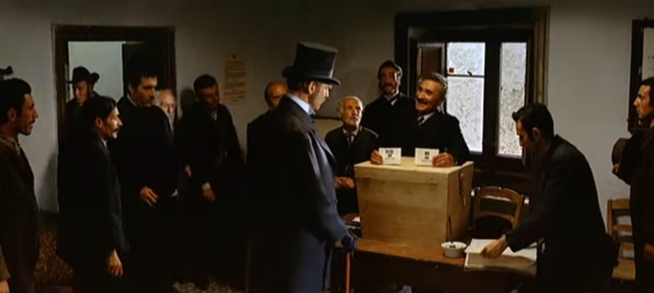 Scena della votazione del plebiscito a Donnafugata nel film Il Gattopardo di Luchino Visconti (1963)